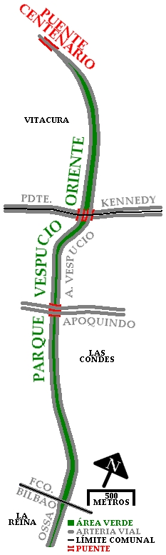 Plano del Parque Vespucio Oriente de Santiago de Chile.